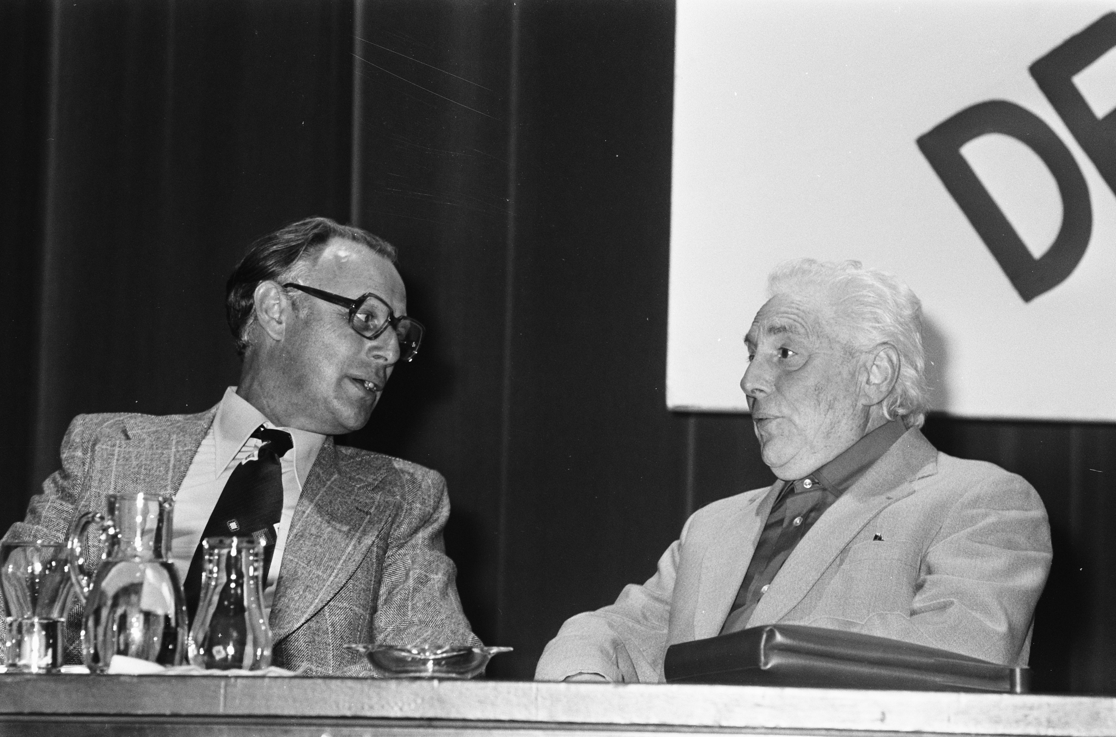 Collectie / Archief : Fotocollectie Anefo Reportage / Serie : Congres van de Communistische Partij Nederland (CPN) in de RAI te Amsterdam Beschrijving : Partijvoorzitter Henk Hoekstra (links) en erevoorzitter Paul de Groot Datum : 6 juni 1975 Locatie : Amsterdam, Noord-Holland Trefwoorden : congressen, politieke partijen, voorzitters Persoonsnaam : Groot, Paul de , Hoekstra, Henk Fotograaf : Fotograaf Onbekend / Anefo Auteursrechthebbende : Nationaal Archief Materiaalsoort : Negatief (zwart/wit) Nummer archiefinventaris : bekijk toegang 2.24.01.05 Bestanddeelnummer : 927-9744